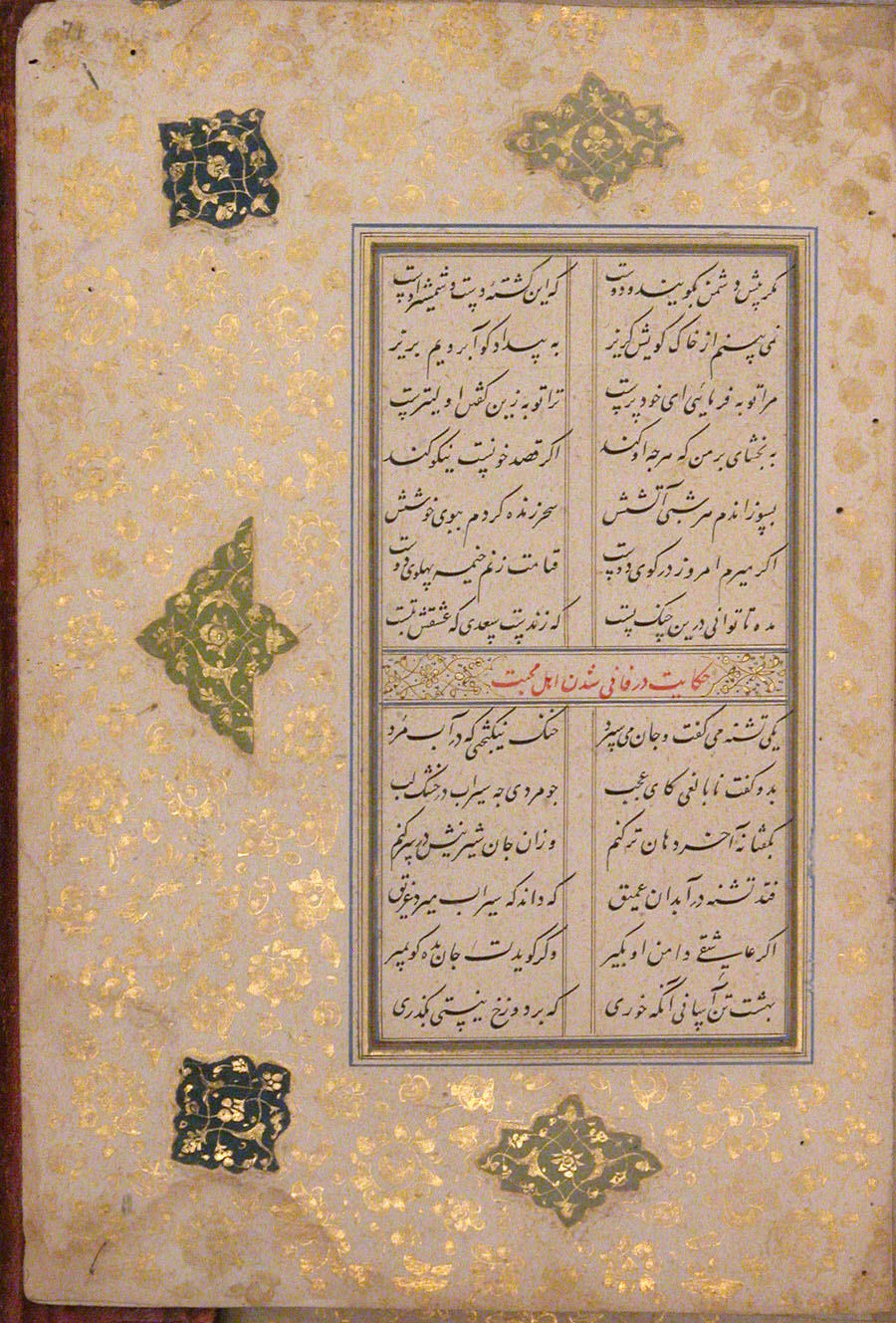 Illustrated manuscript; Codices